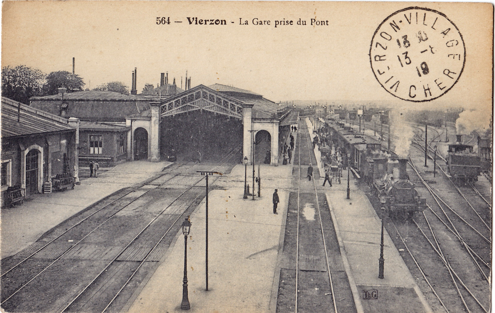 Carte postale ancienne éditée par TH. G., n°564: Vierzon - La gare vue du Pont.